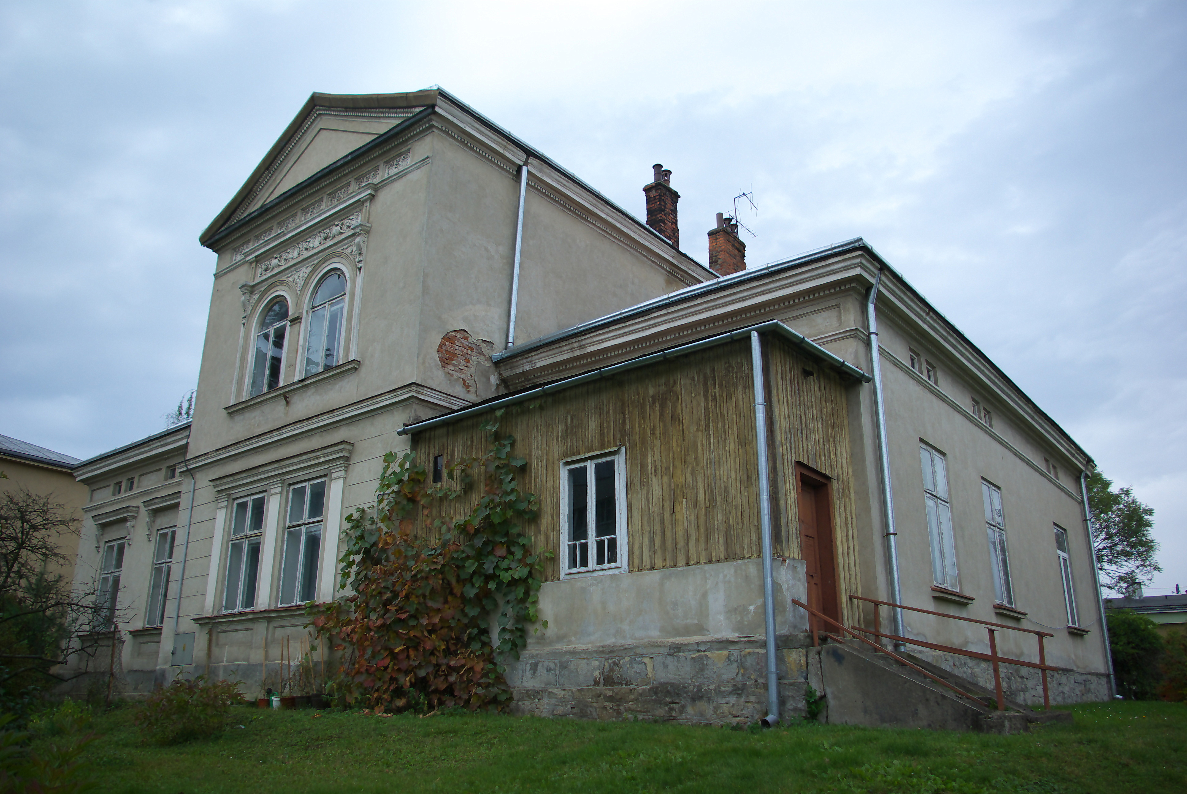 Dom przy ulicy Sobieskiego 9 w Sanoku